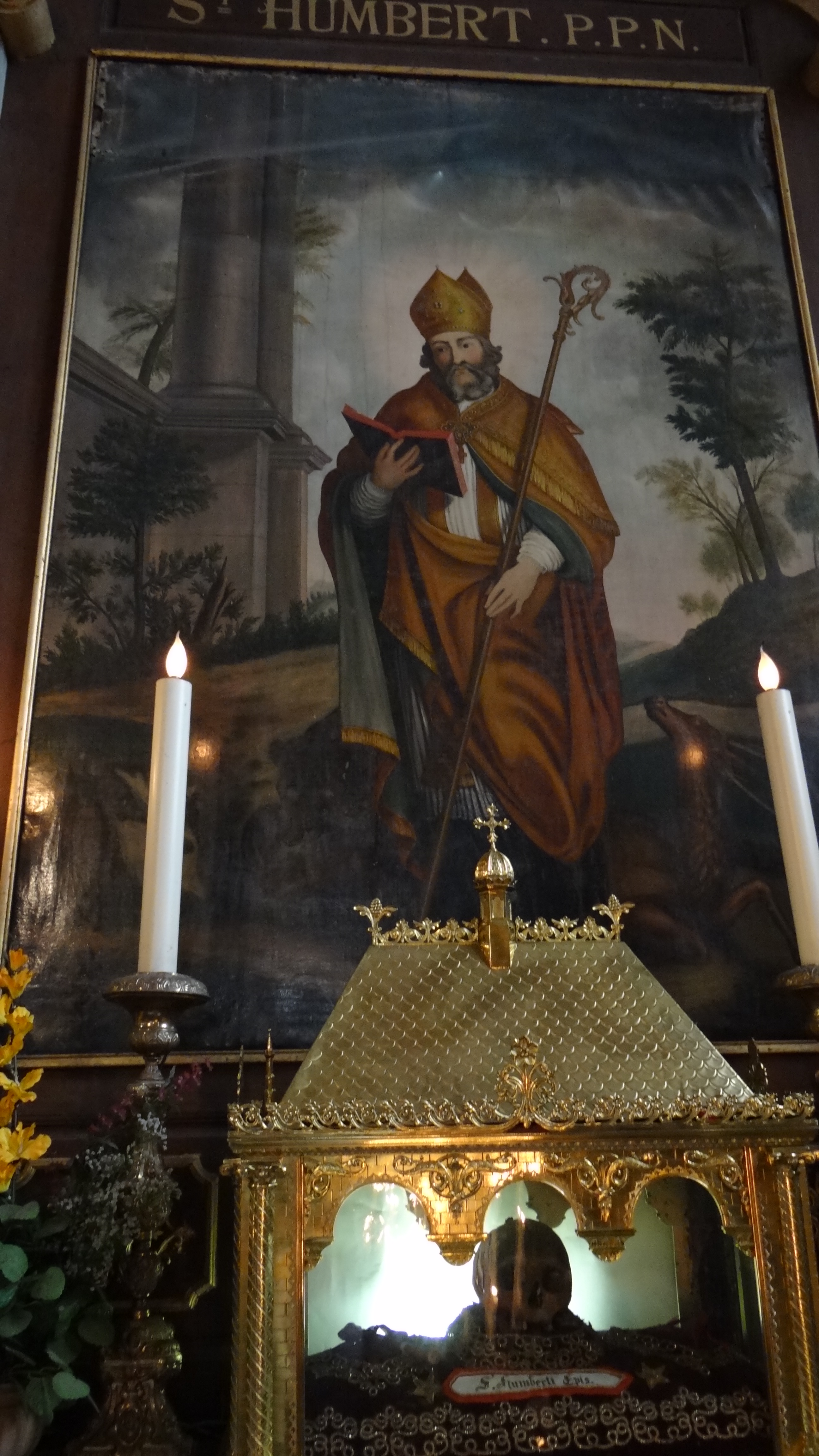 Humbert du Hamel - (659-25 03 682) fondateur de l'Abbaye de Maroilles